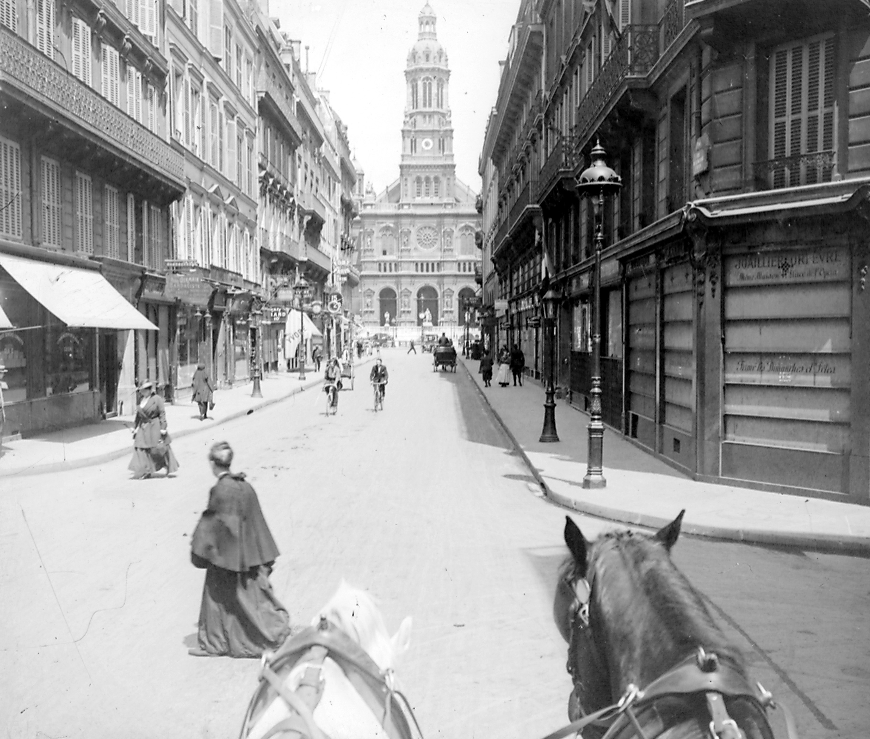 Paris, Eglise de La Trinité. Photo prise par mon grand-père Maurice Terrien pendant la guerre de 14-18